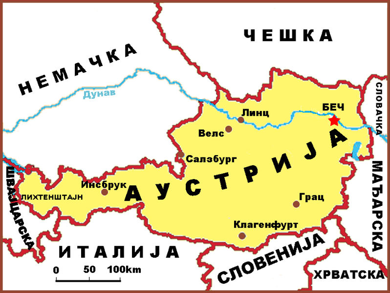 Аутор: Саша Костић Корисничко име: Леса Цртеж у Фотошопу Licensing